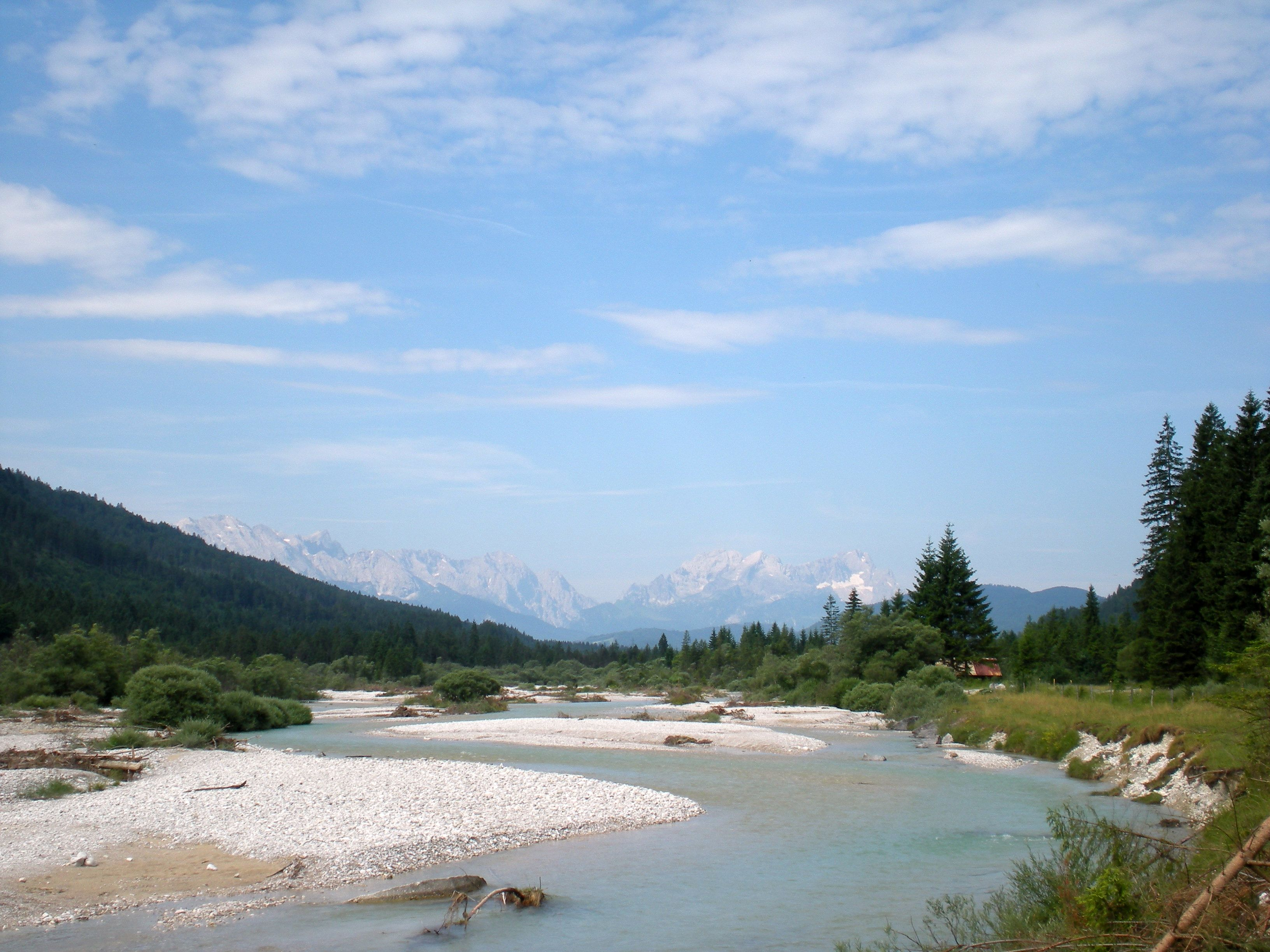 Paisaje bávaro, con el río Isar en verano. Acceso por la carretera de peaje de Wallgau a Vorderris.